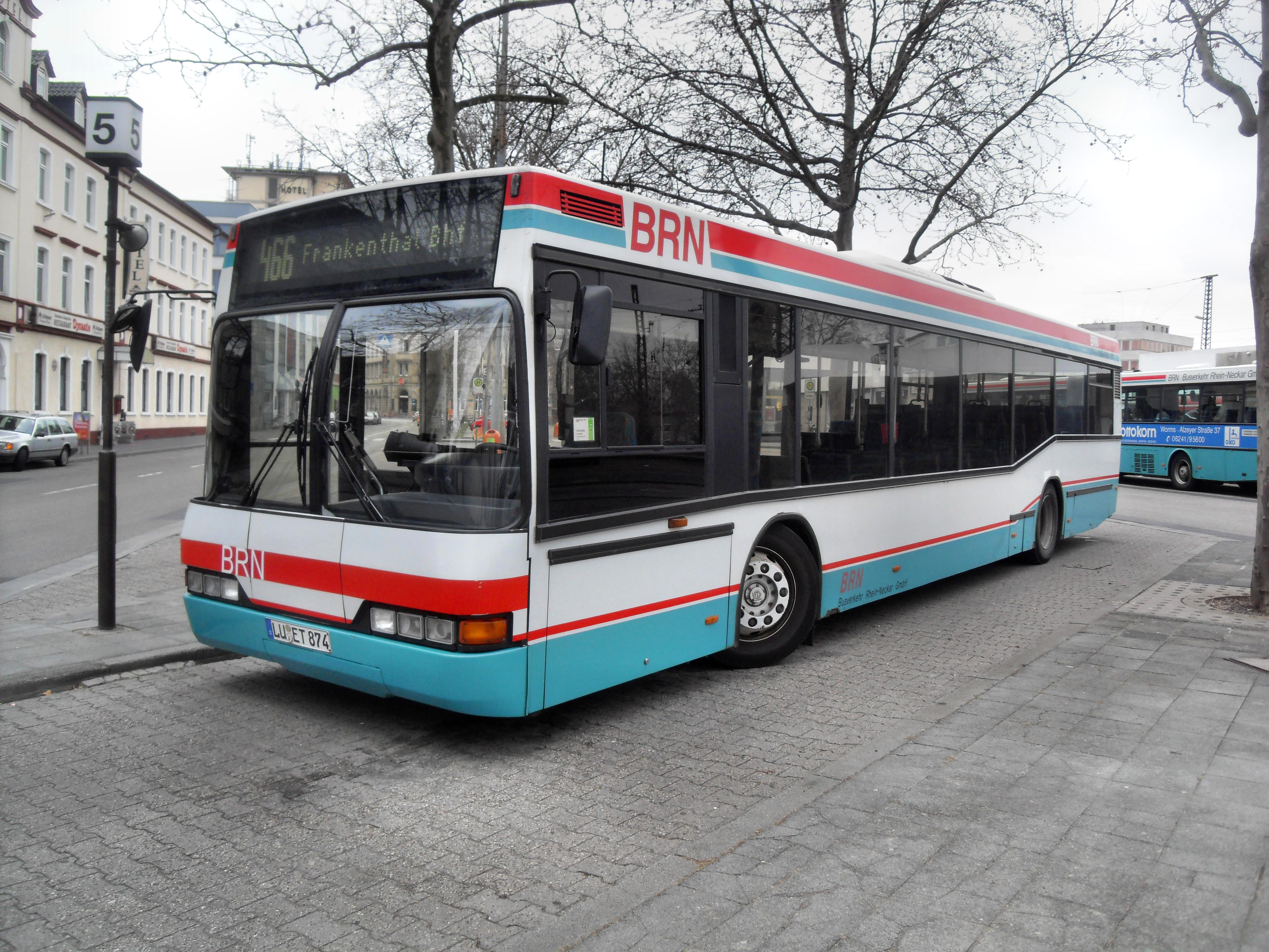 Bus der Firma Neoplan im Frankenthaler (Pfalz) Busbahnhof.